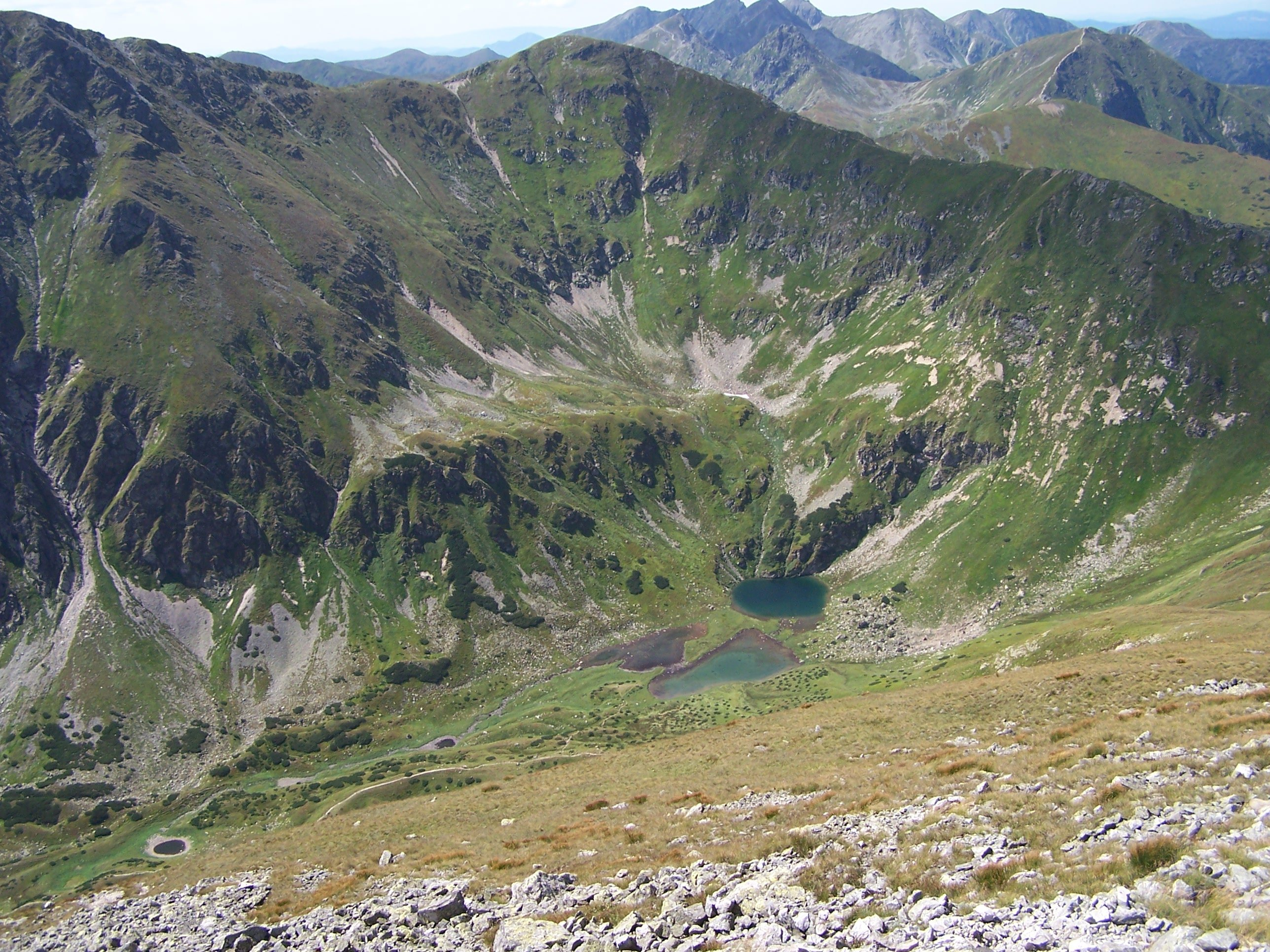 Jarząbczy Wierch(Tatra Mountains)